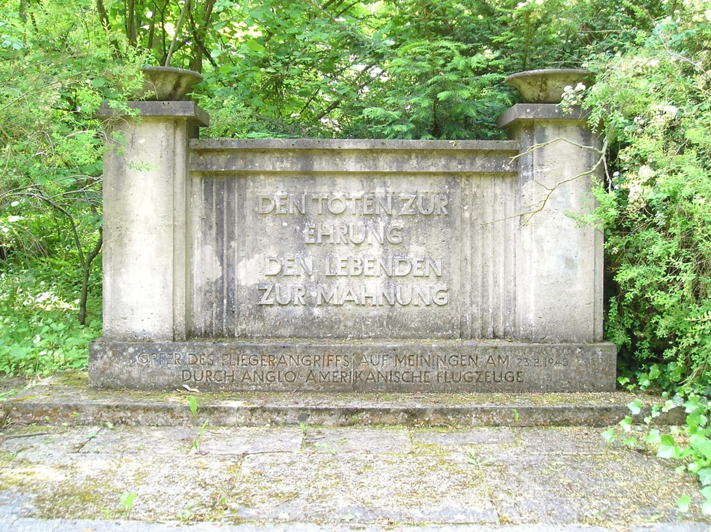 Gedenkstein für die Opfer der Luftangriffs auf Meiningen am 23. Februar 1945 im Ehrenhain auf dem Parkfriedhof.